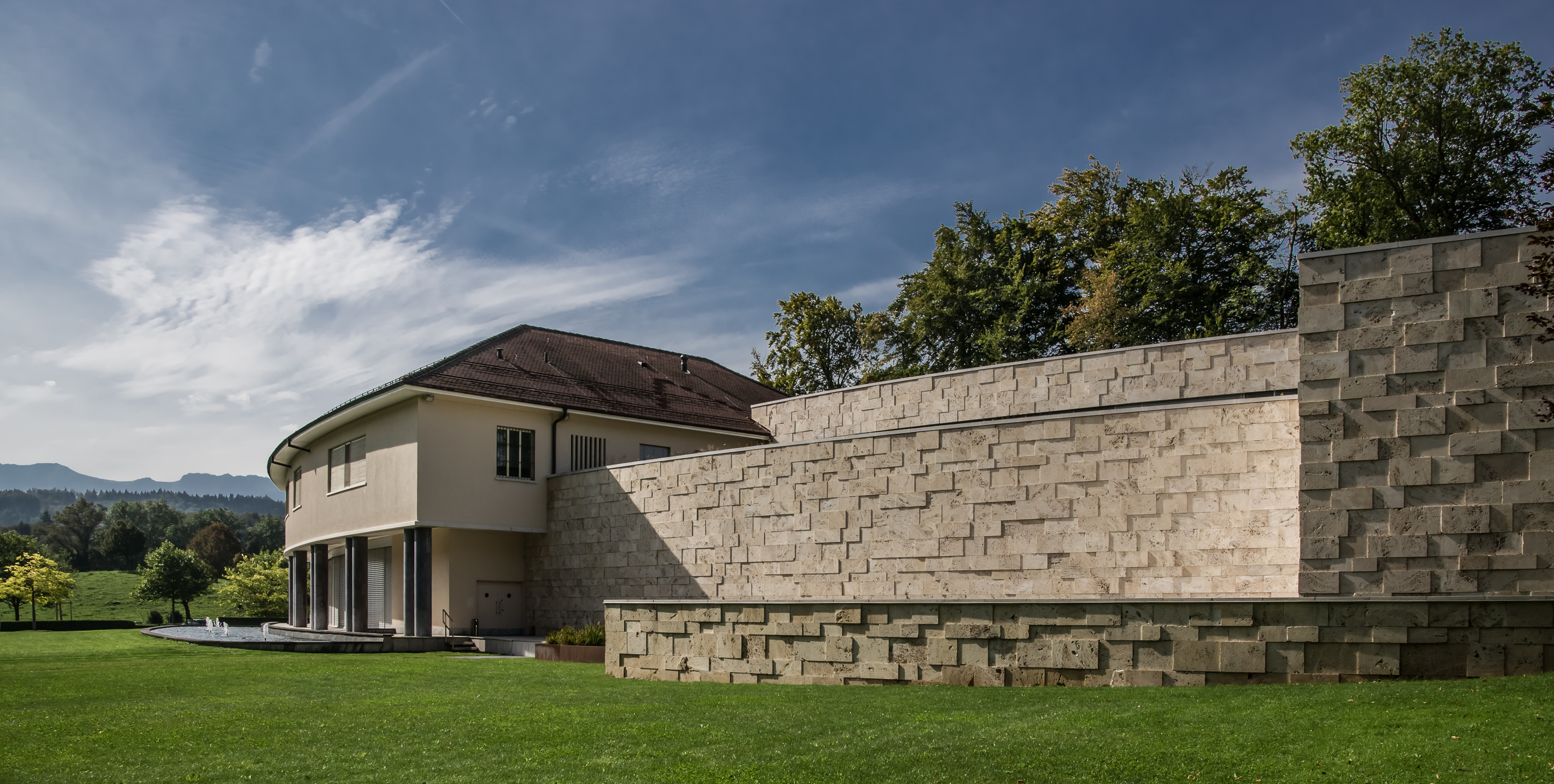 Abegg-Stiftung (Gebäude), Zentralgebäude in der Architektur der 1960er Jahre und Neubau 2009 - 2011